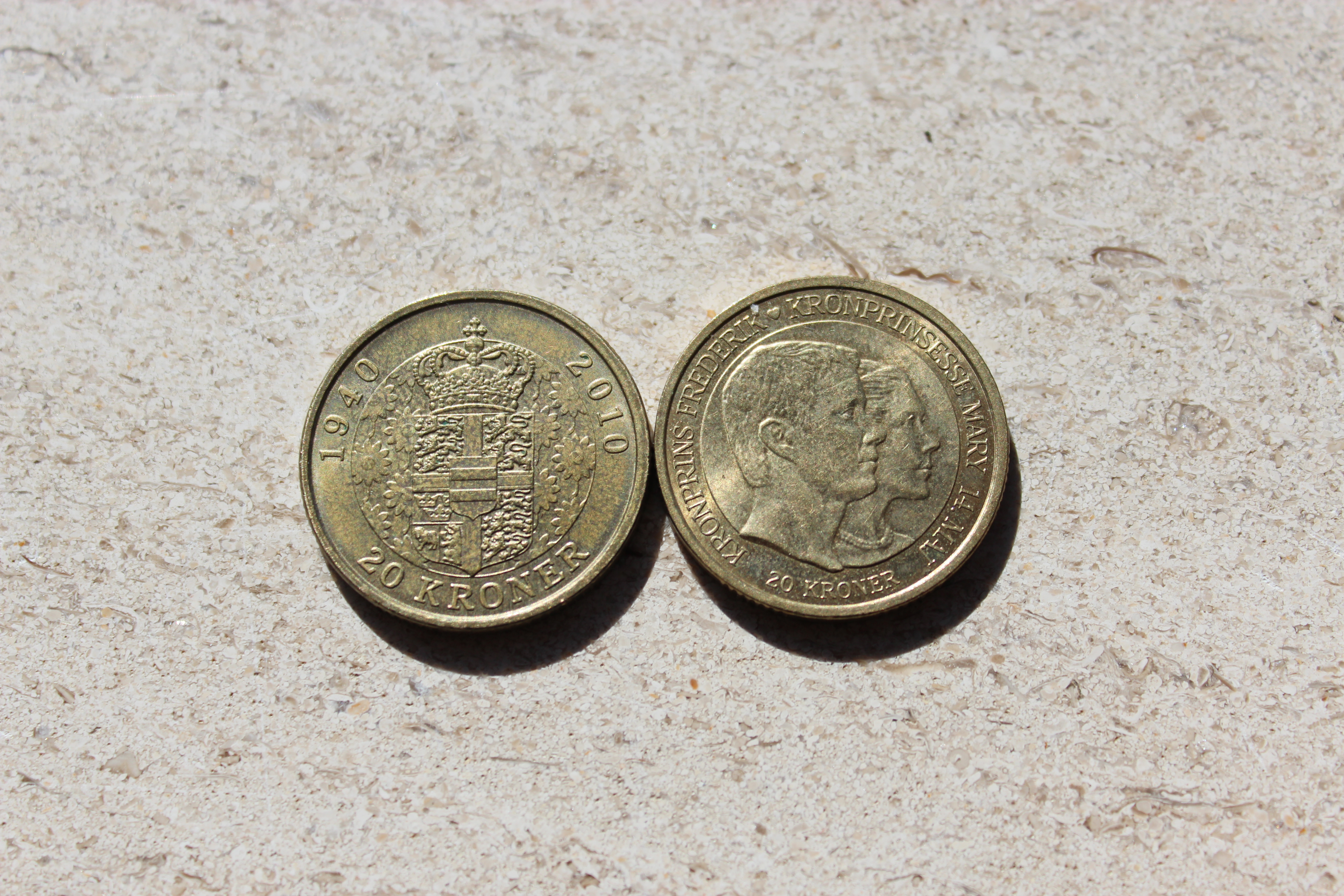 To danske 20-kroner. Udsendt i forbindelse med Margrethe II 70 års fødselsdag i 2010 og kronprins Frederiks bryllup med Mary Donaldson i 2004.